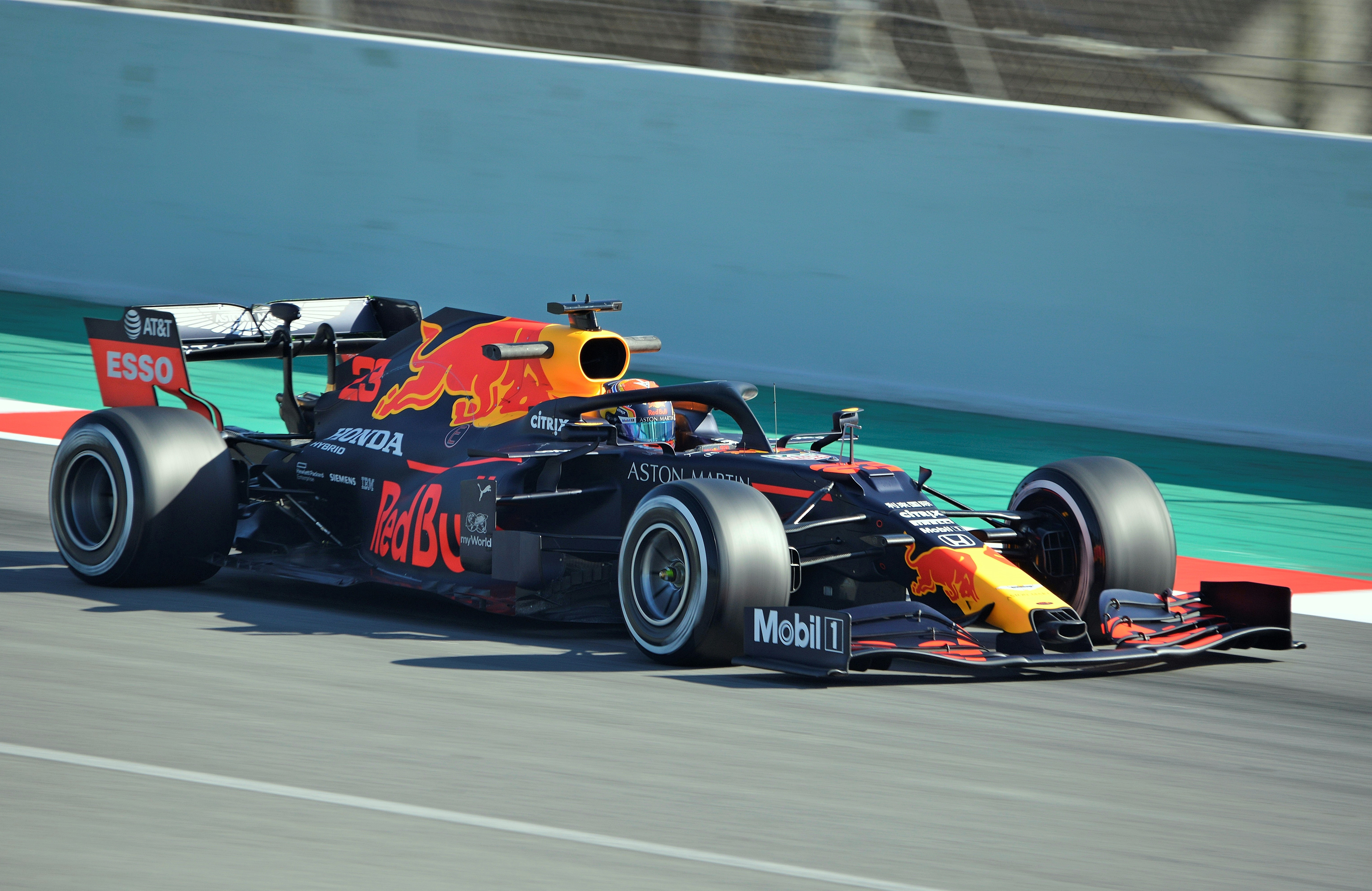 Test Days F1-2020